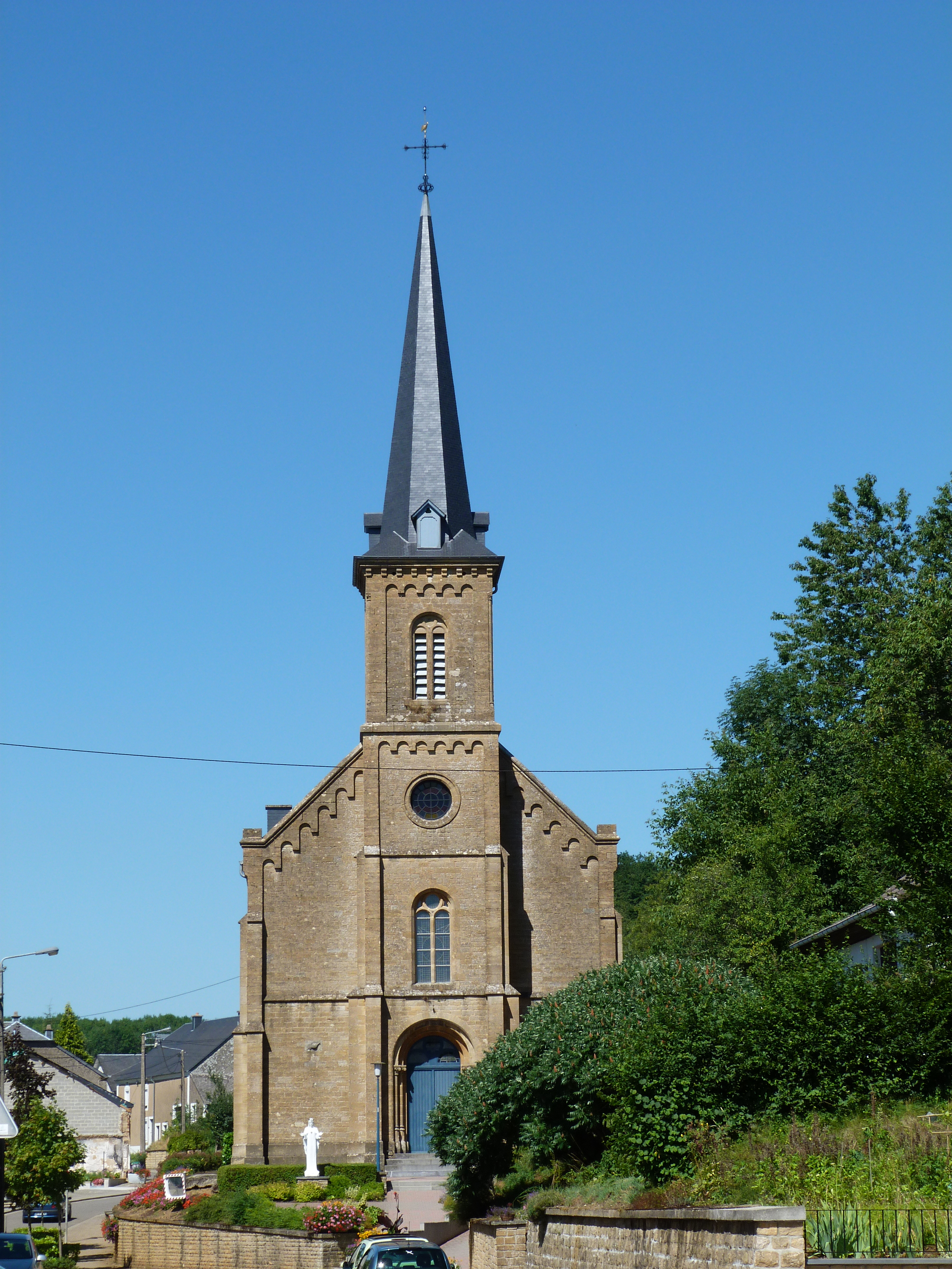 L'église de Rachecourt en août 2013.